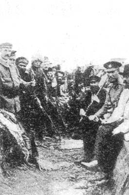 中文（中国大陆）: 在江东六十四屯进行屠杀的俄军